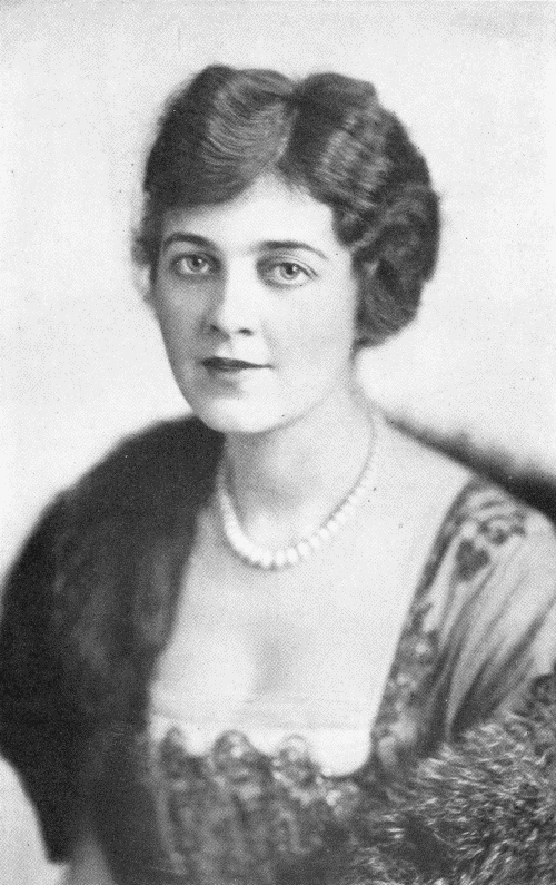 Julia Sanderson